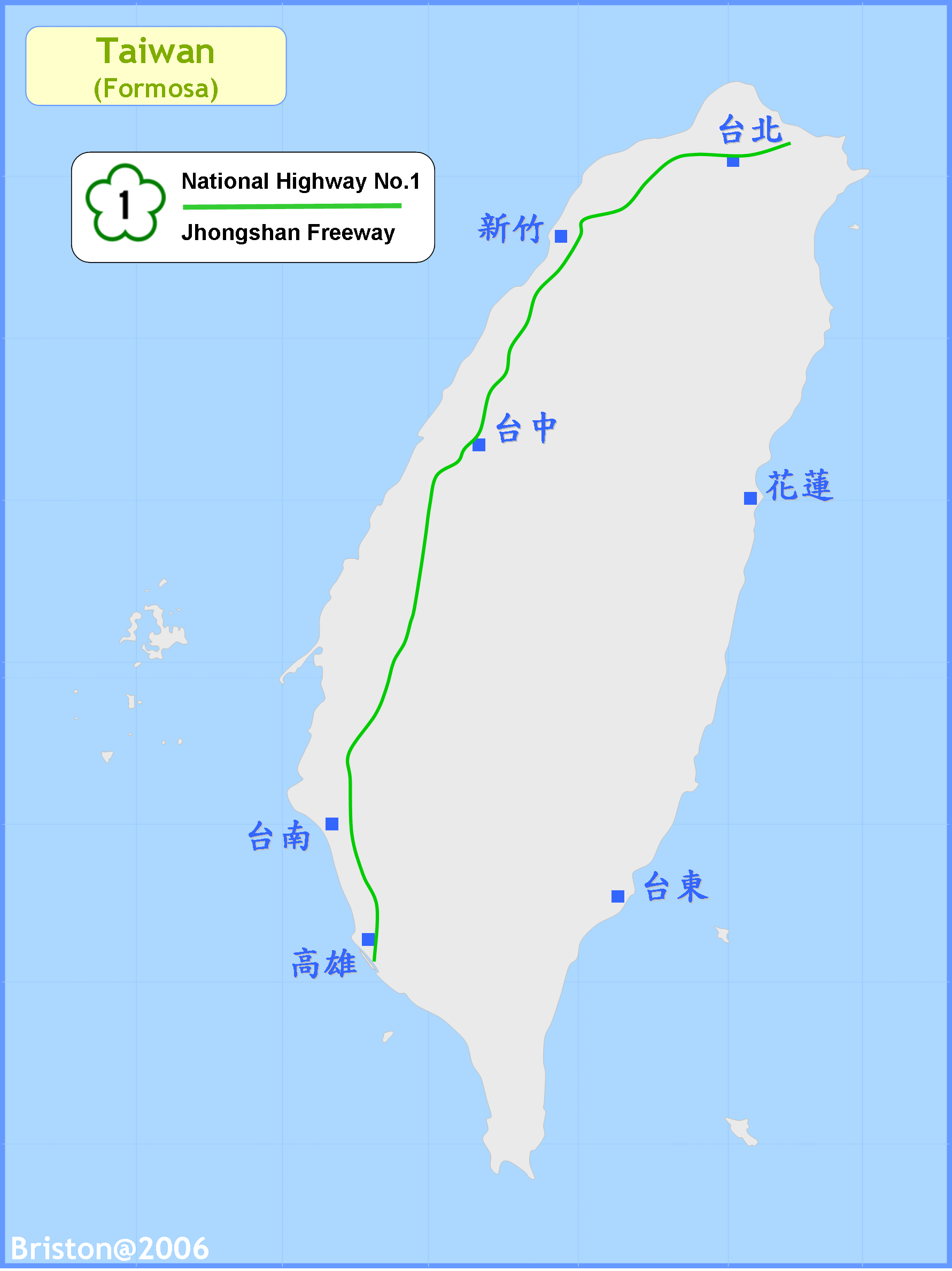 Taiwan_National_Highway_No_1